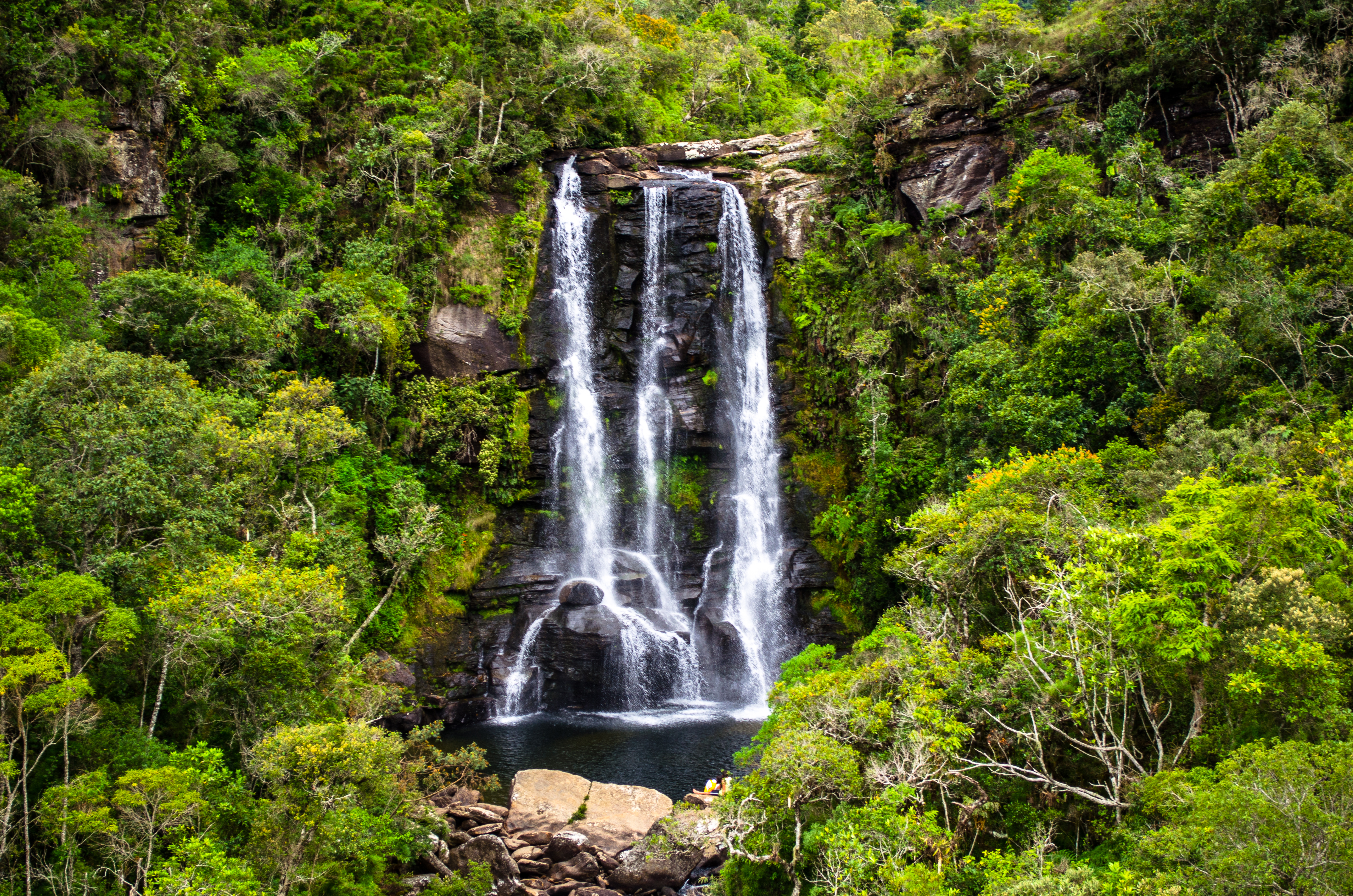 Cachoeira dos Garcias em janeiro de 2015 vista da trilha que desce à base da cachoeira